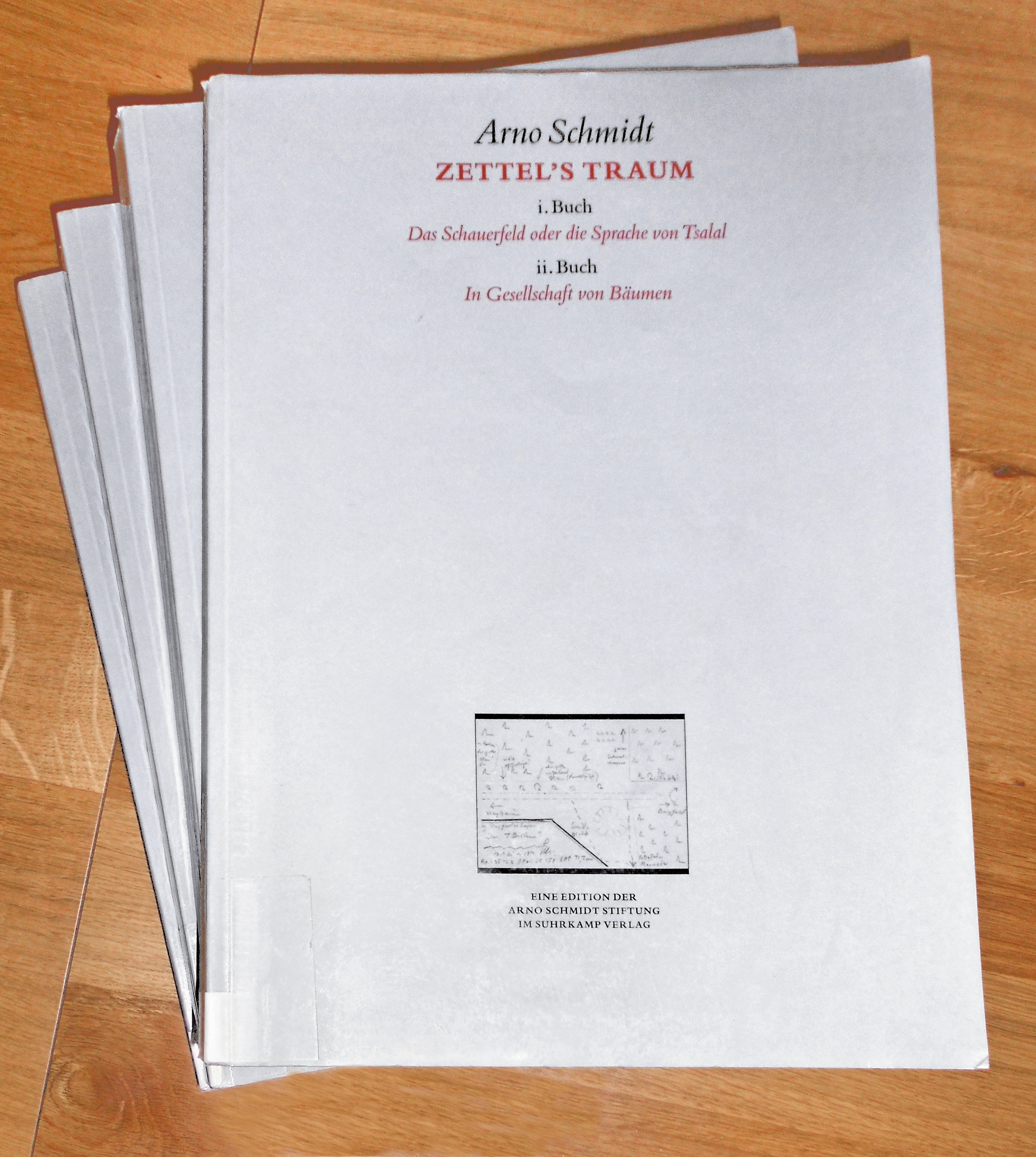 Arno Schmidts Zettel's Traum, Taschenbuchausgabe (33,8 x 25cm), Suhrkamp 2010. Titelblatt - keine Schöpfungshöhe